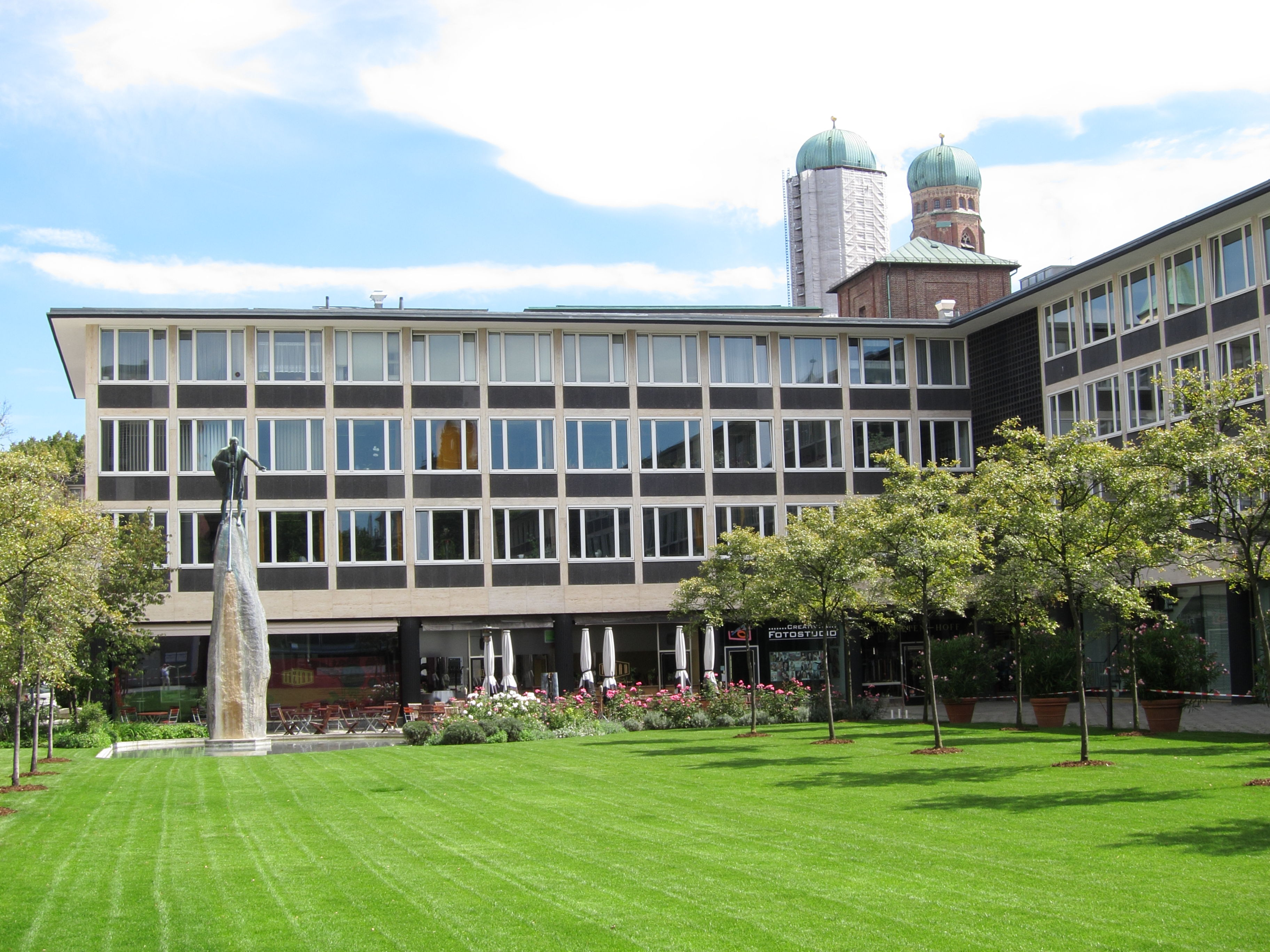 Maxburg, Innenhof, Maxburgstraße 2 und 4, Amtsgericht München